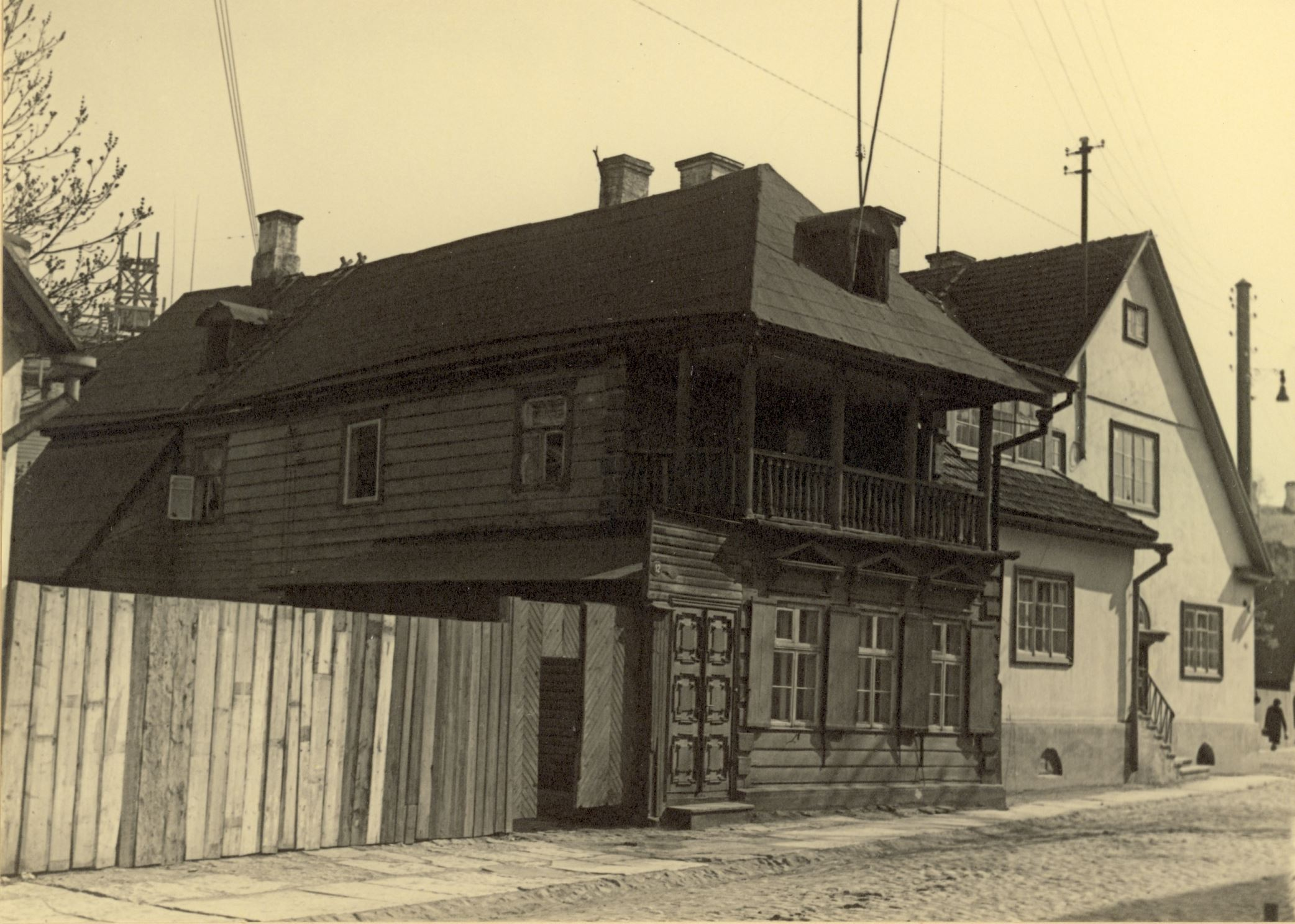 V-Kompassi tn 12, kinnistu nr 605